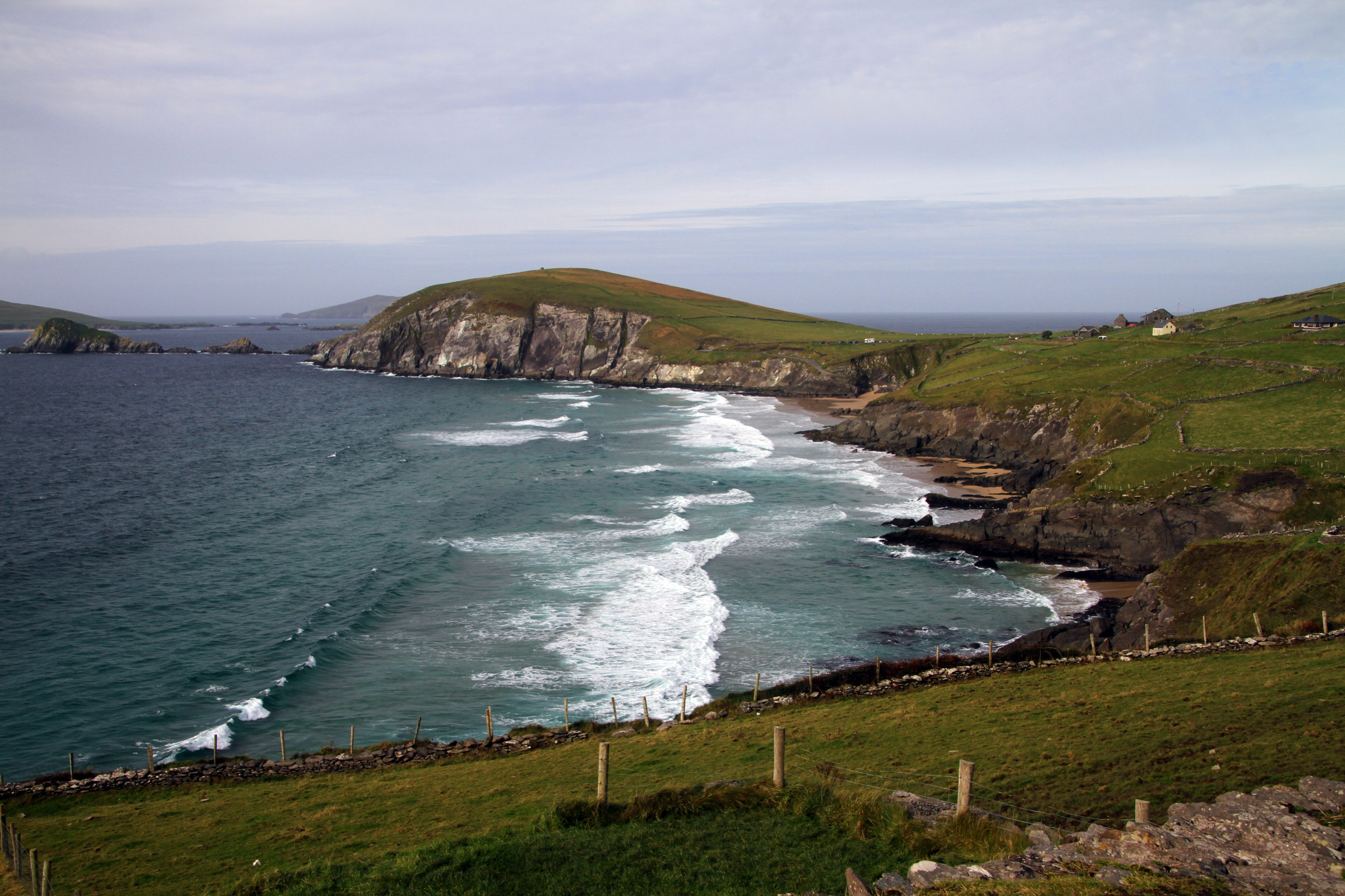 Slea Head, Kap in Irland